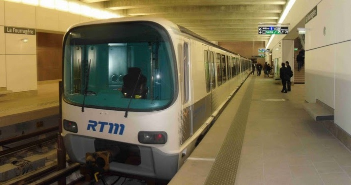 Une rame à quai en station "La Fourragère", terminus de la ligne 1 du métro de Marseille.